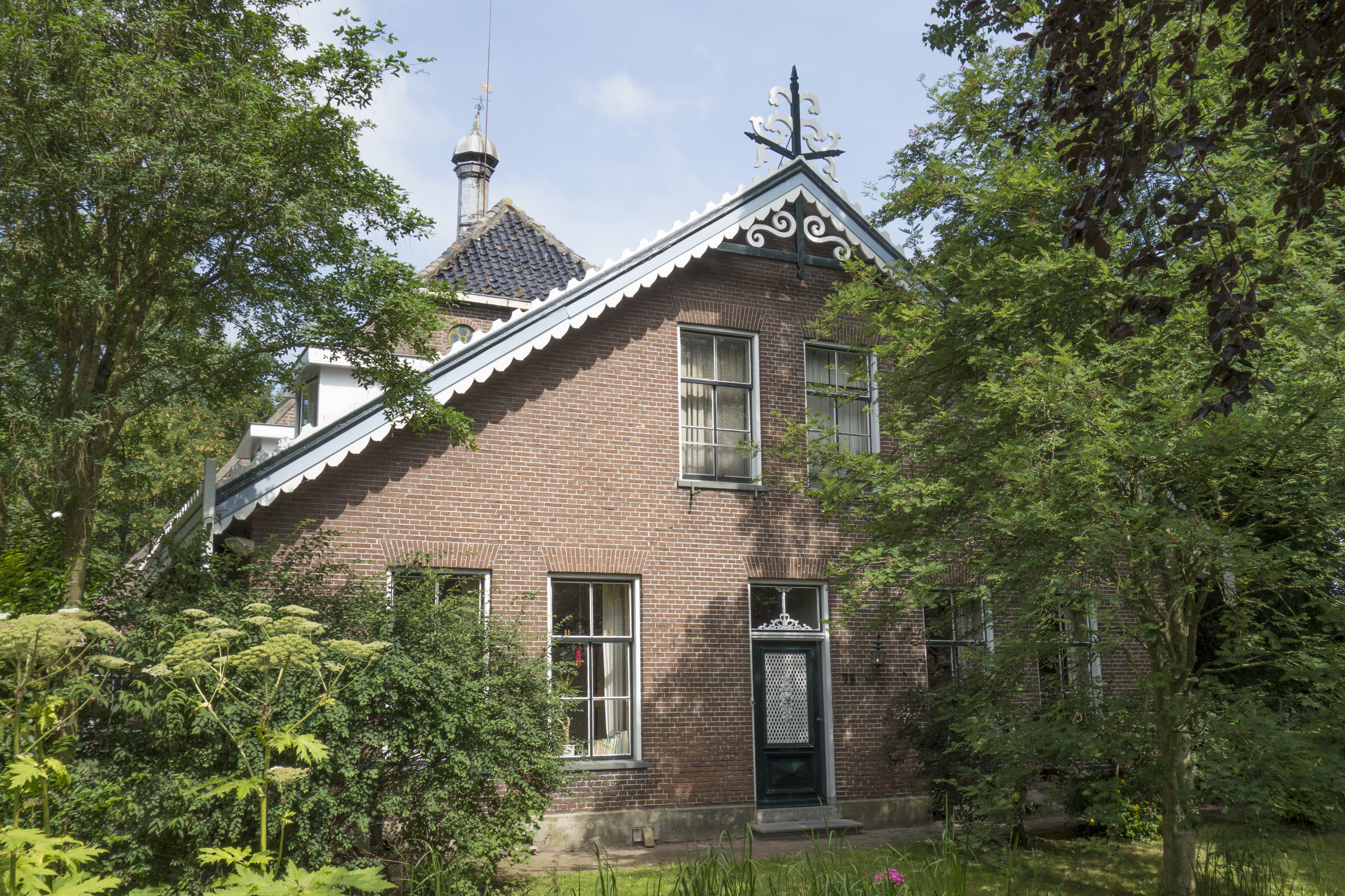 Boerderij (kop-romp) met op de achtergrond de stal/schuur.